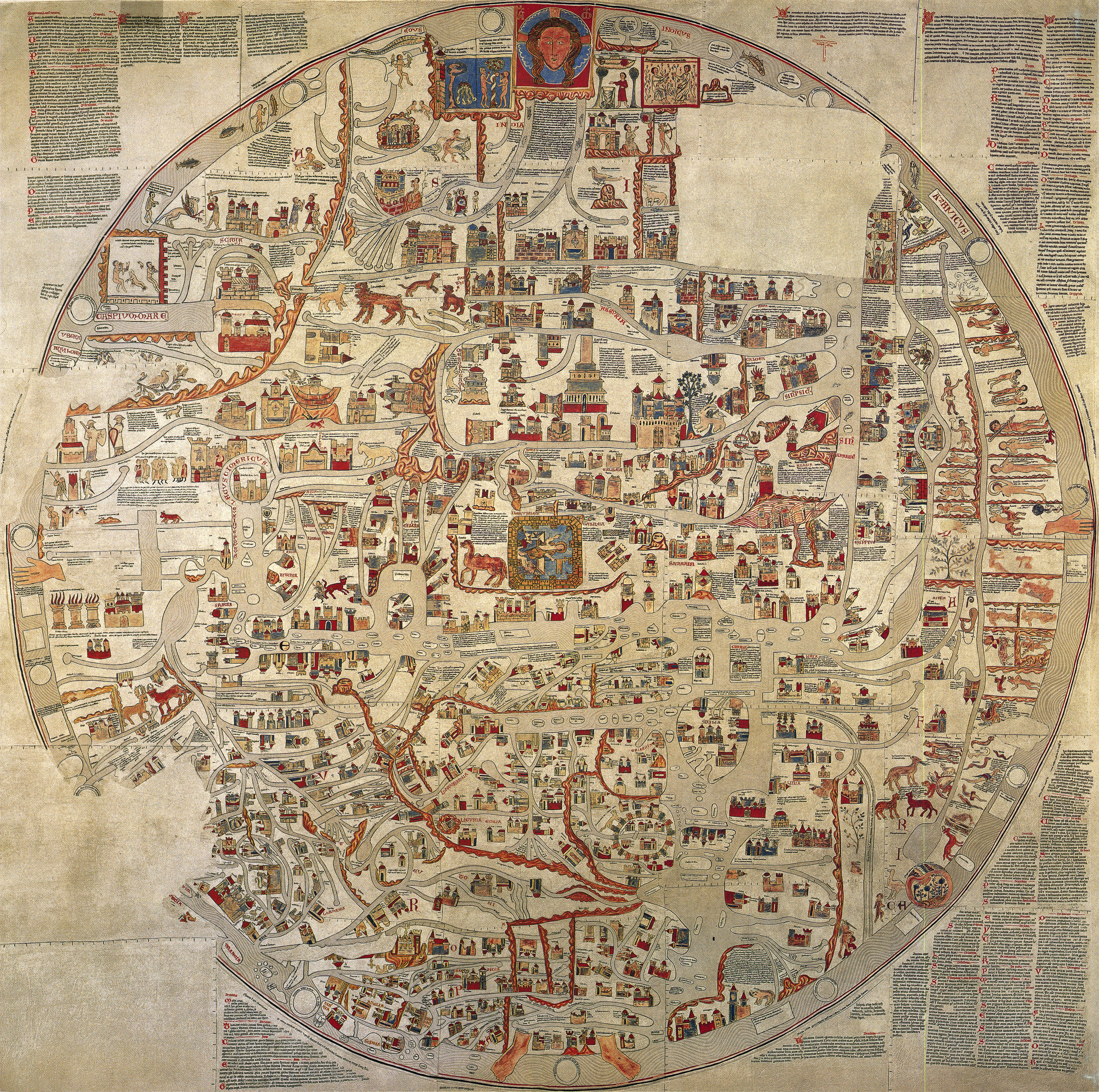 Ebstorfer Weltkarte, ca. 1300, wahrscheinlich im Ebstorfer Kloster (Lüneburger Heide) hergestellt